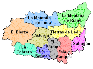 Áreas Funcionales de León (Castilla y León)